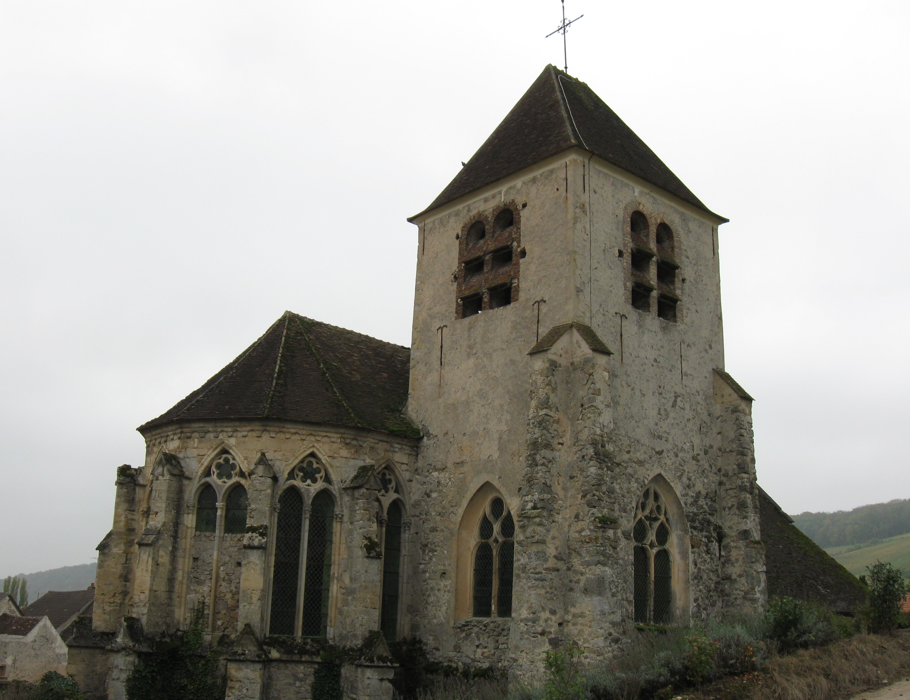 Église catholique Notre-Dame de Bonneil. (département de l'Aisne , région Picardie).